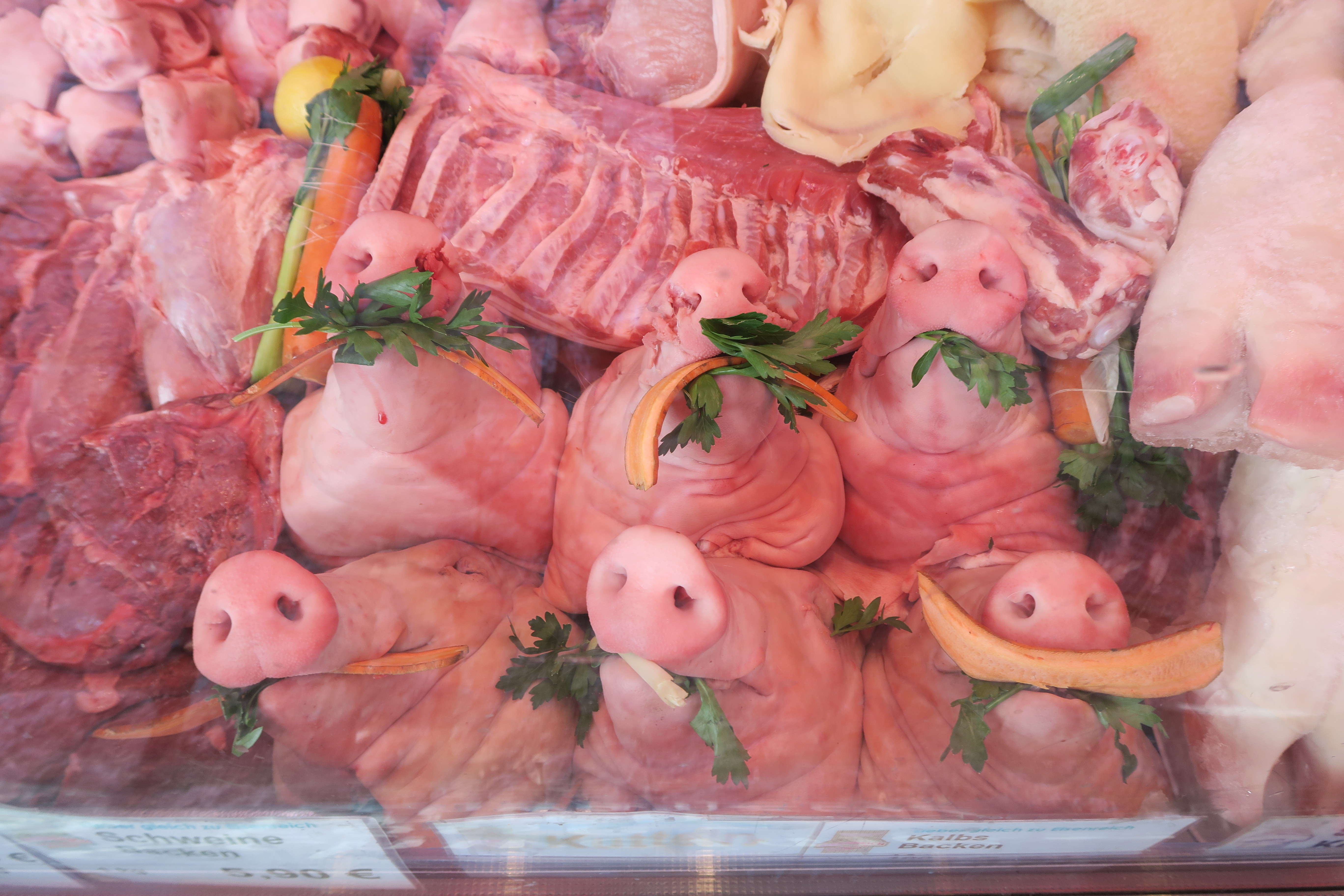 Schweinsköpfe auf dem Viktualienmarkt in München